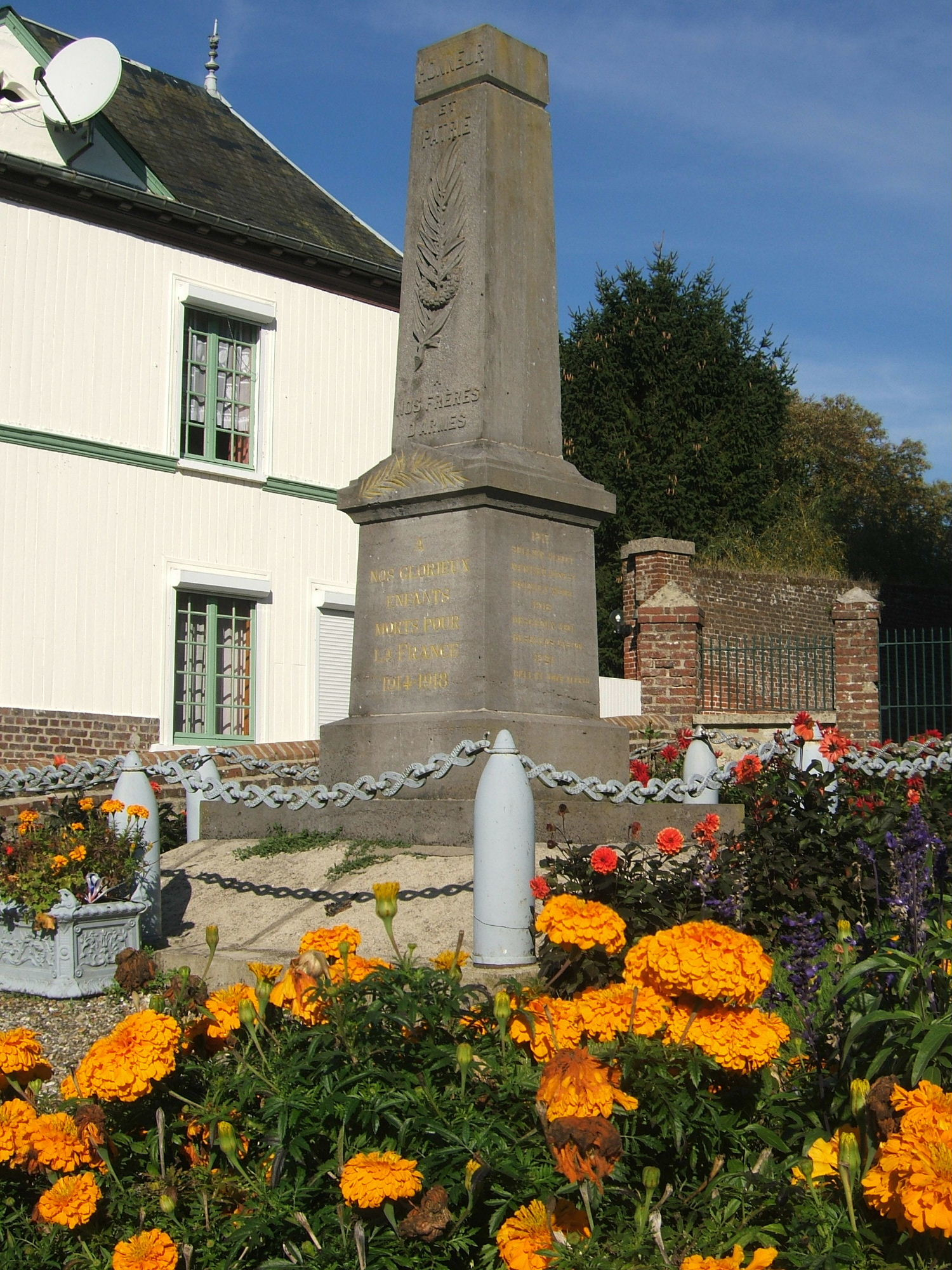 Monuments aux morts de Canny-sur-Thérain (Oise, France) / War memorial in Canny-sur-Thérain (Oise, France)